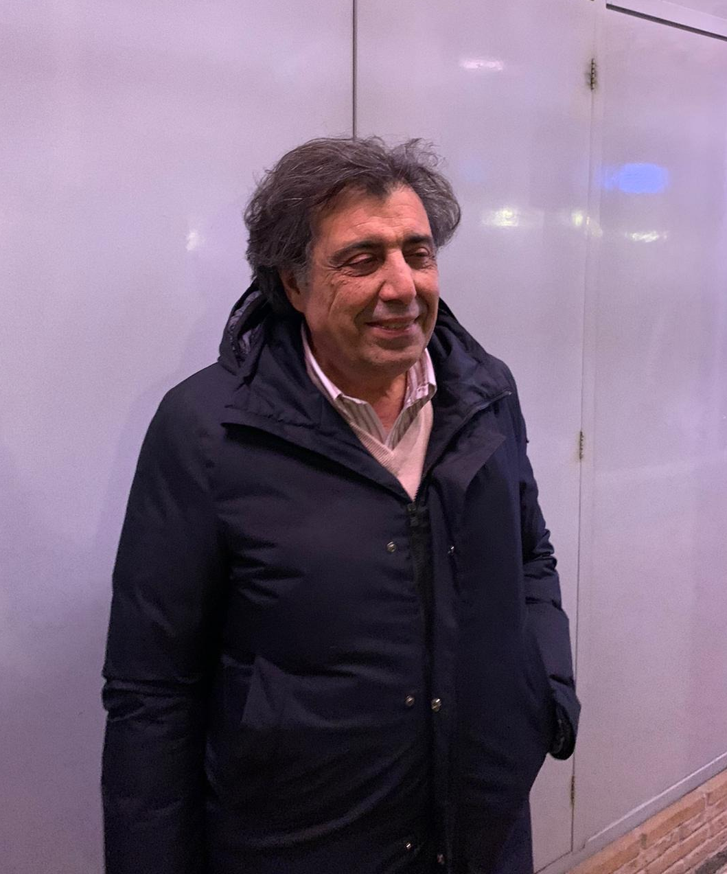 Piero Torri giornalista italiano